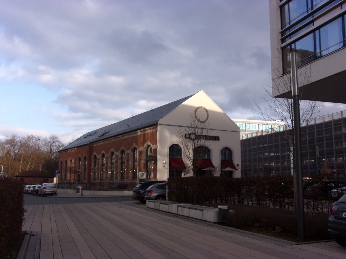 Ehemaliges Kraftwerk Tullnau in Nürnberg